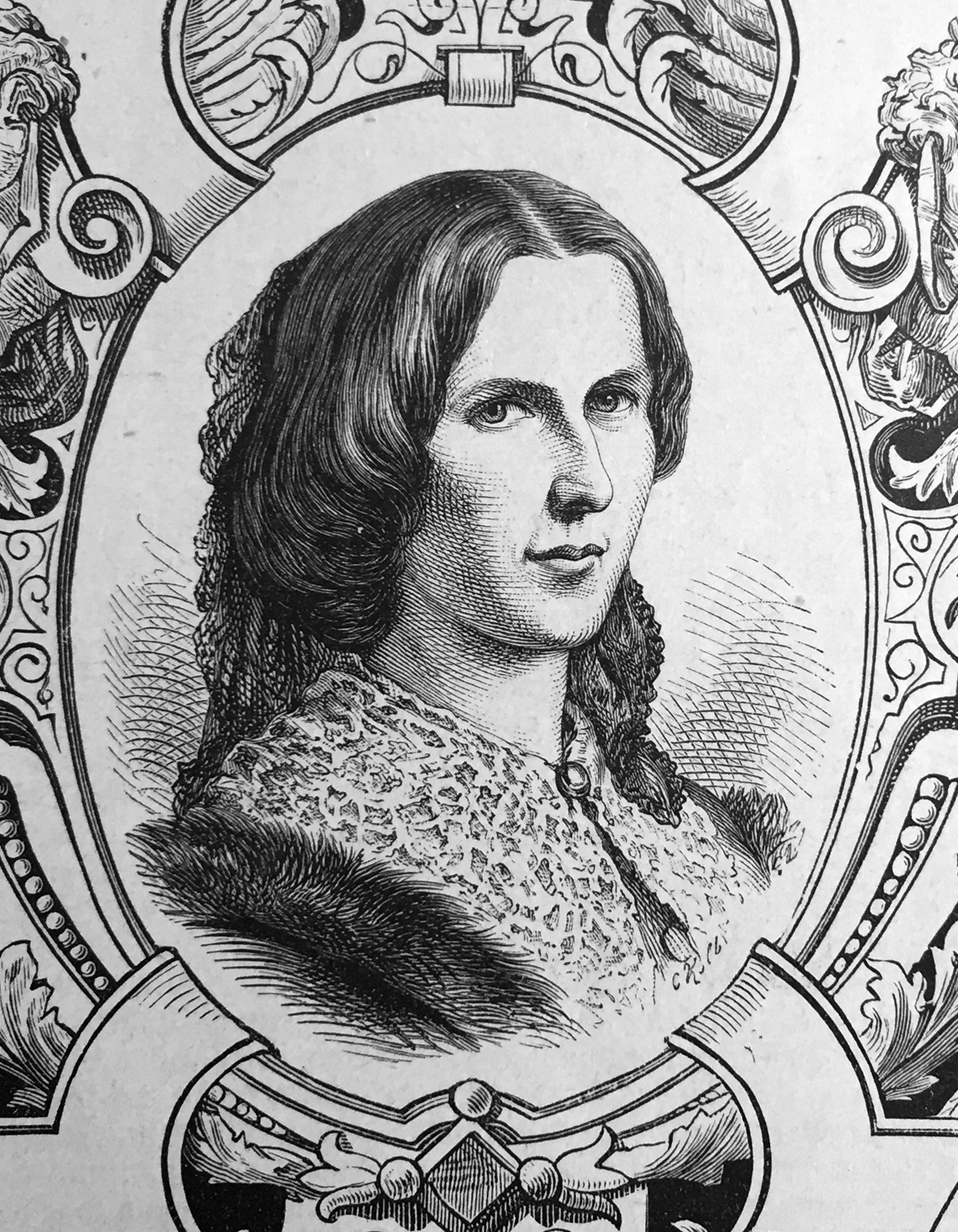 Bildnis Allwine Schroedter 1879